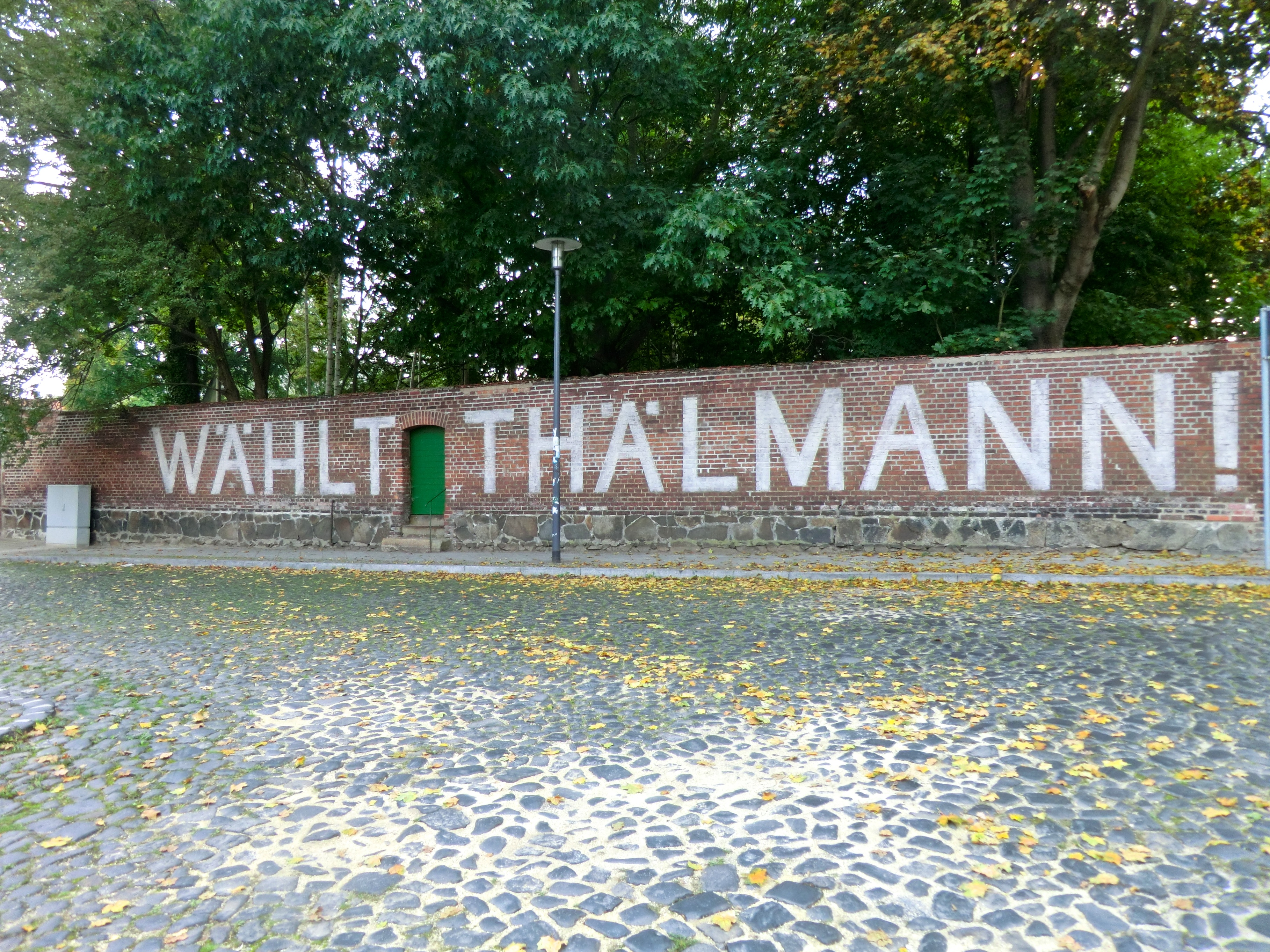 Wählt Thälmann! Schriftzug Görlitz Bergstraße (2014)